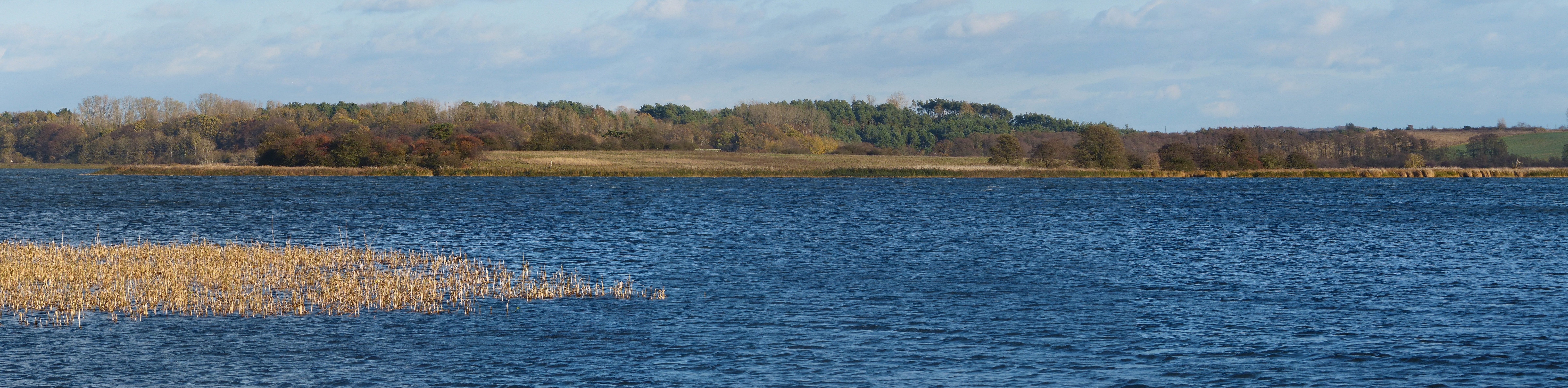 Balmer Werder aus westlicher Richtung vom Bootsanleger Balm aus gesehen